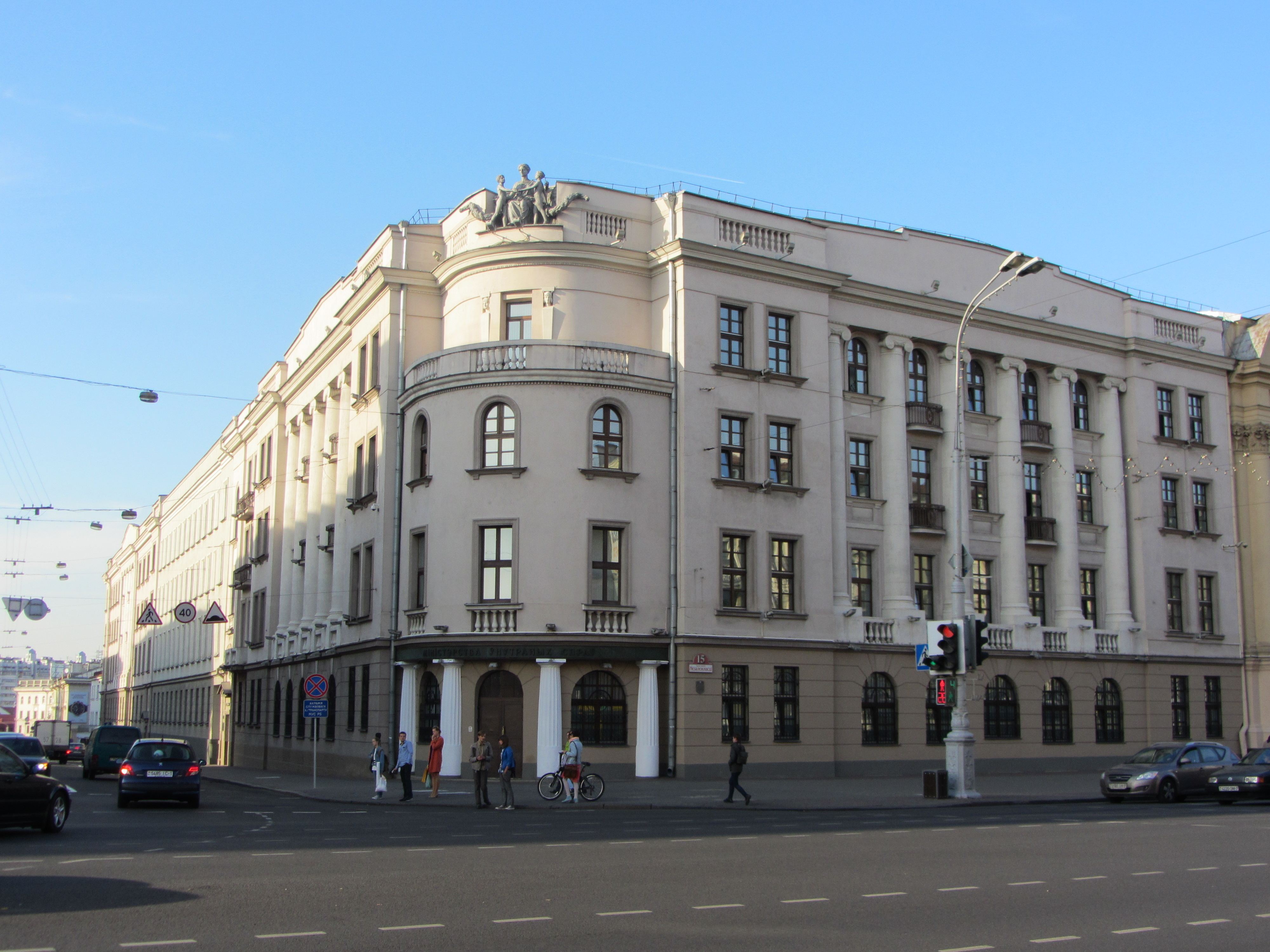 Беларуская (тарашкевіца): Колішні дом Менскага земляробчага таварыства ў Менску.